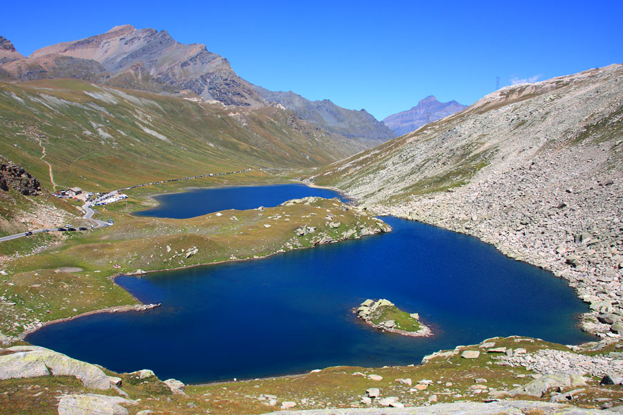 I laghi del Nivolet situati immediatamente sotto il colle omonimo in alta Valsavarenche (Valle d'Aosta)